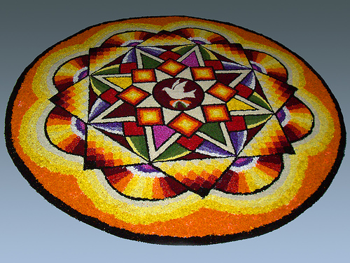 ഓണപ്പൂക്കളം